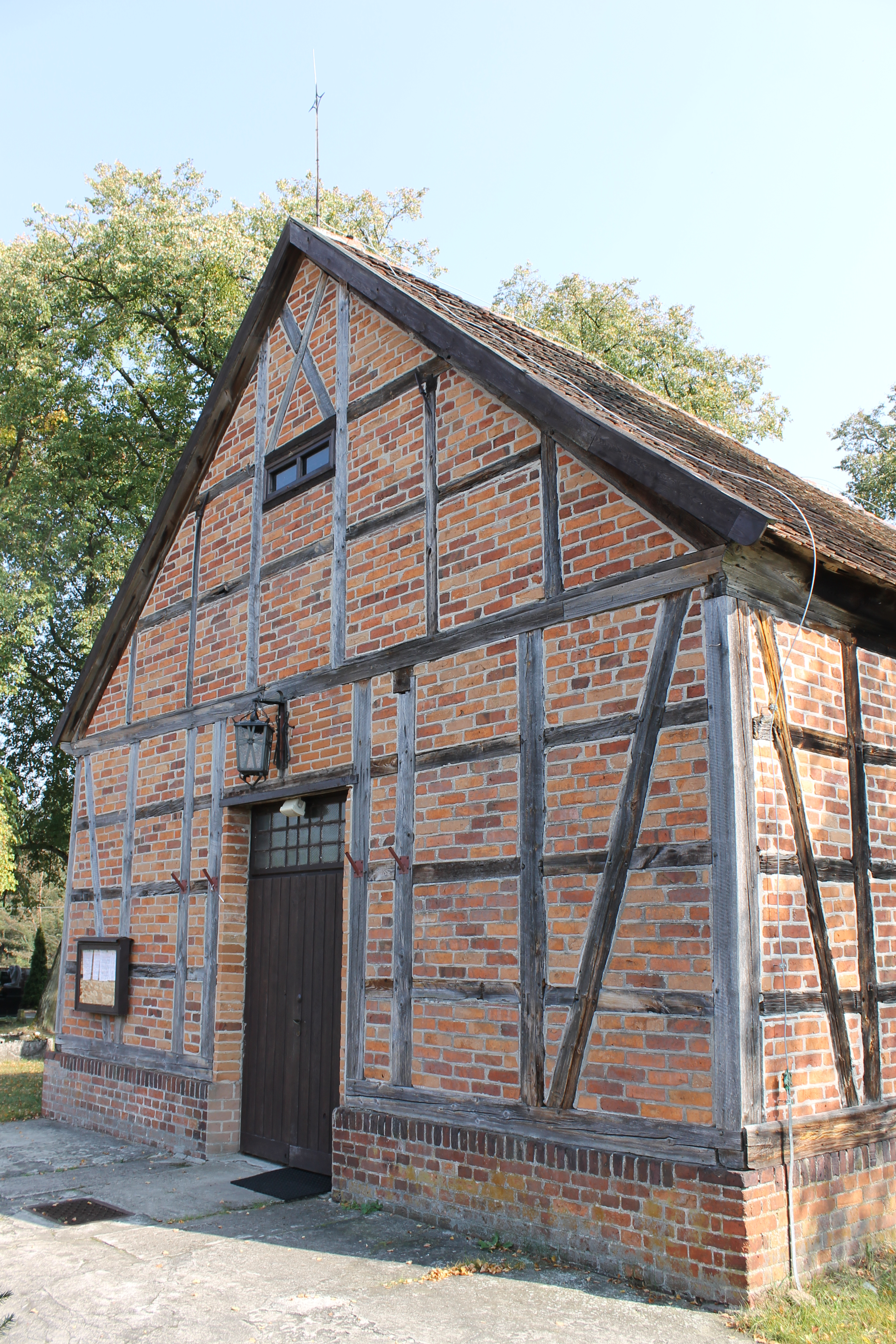 Pędzewo, kaplica cmentarna ewangelicka, ob. kościół filialny rzym.-kat. pw. Najświętszego Serca Pana Jezusa, 1843